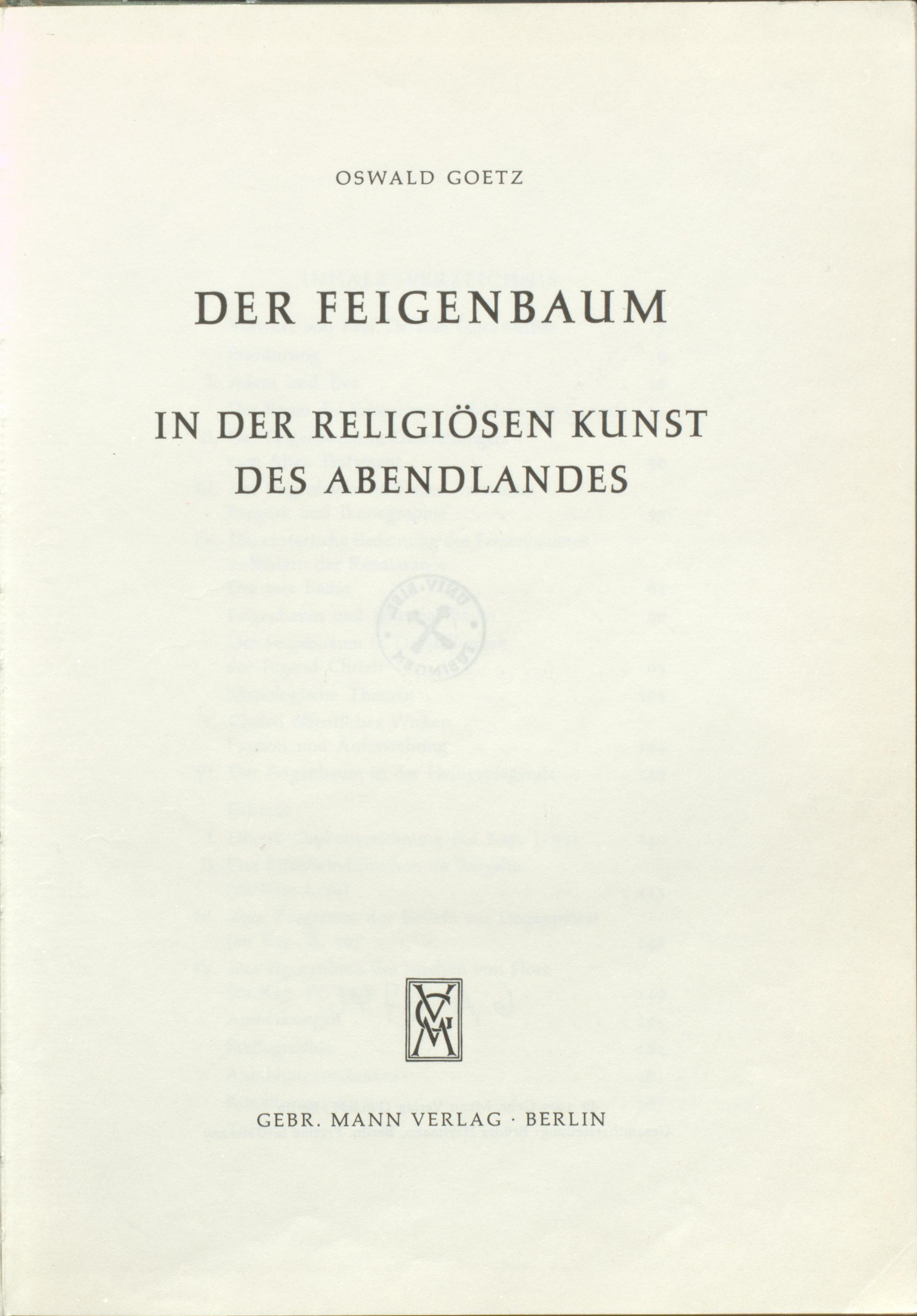 Oswald Goetz Der Feigenbaum in der religiösen Kunst des Abendlandes. Berlin : Mann, 1965 Titel